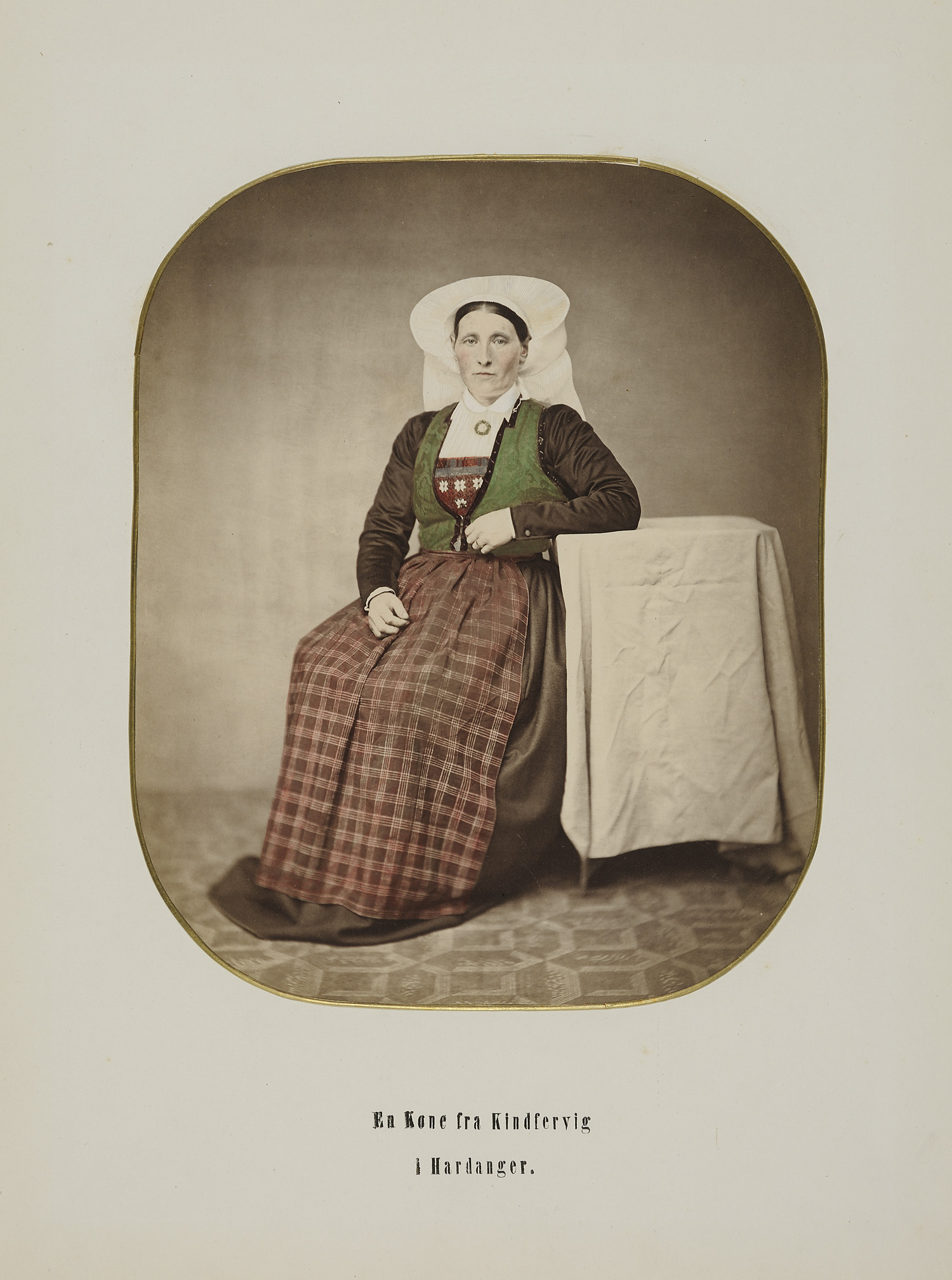 Selmer, Marcus Kone fra Kindservig i Hardanger. Ca. 1857-1870 Håndkolorert positivkopi, saltpapir Størrelse: 412x310 mm NMFF.001370-16